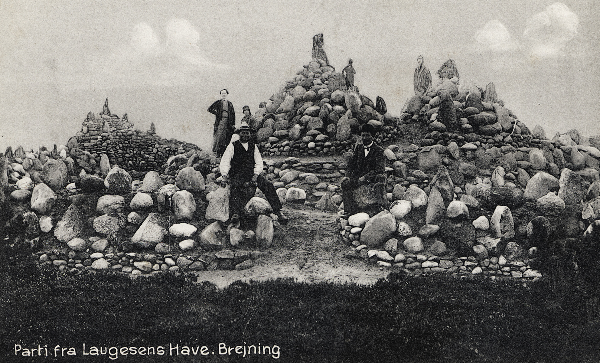 Parti fra Laugesens Have